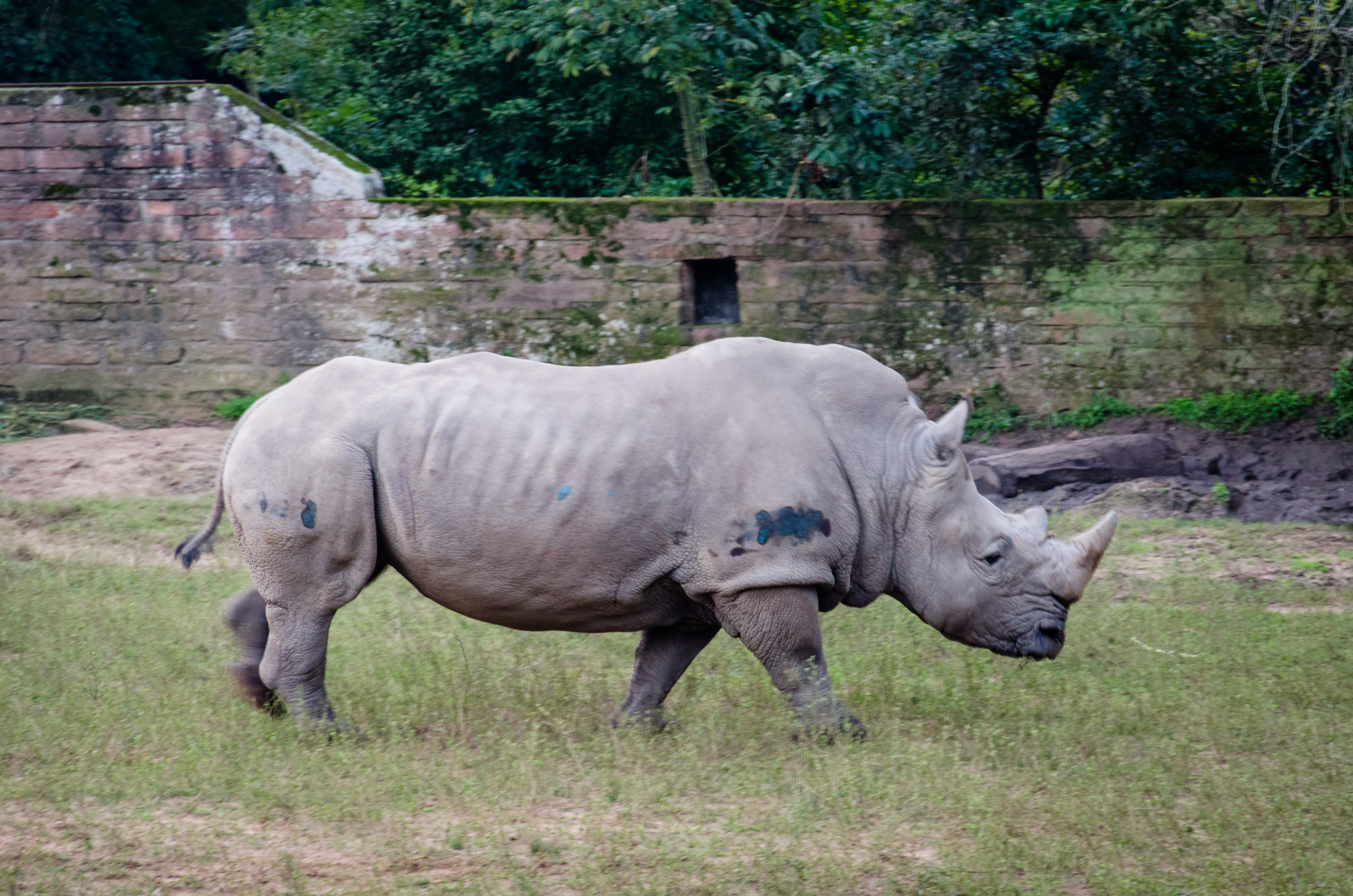 Rinoceronte branco no Zoológico de Sapucaia do Sul RS